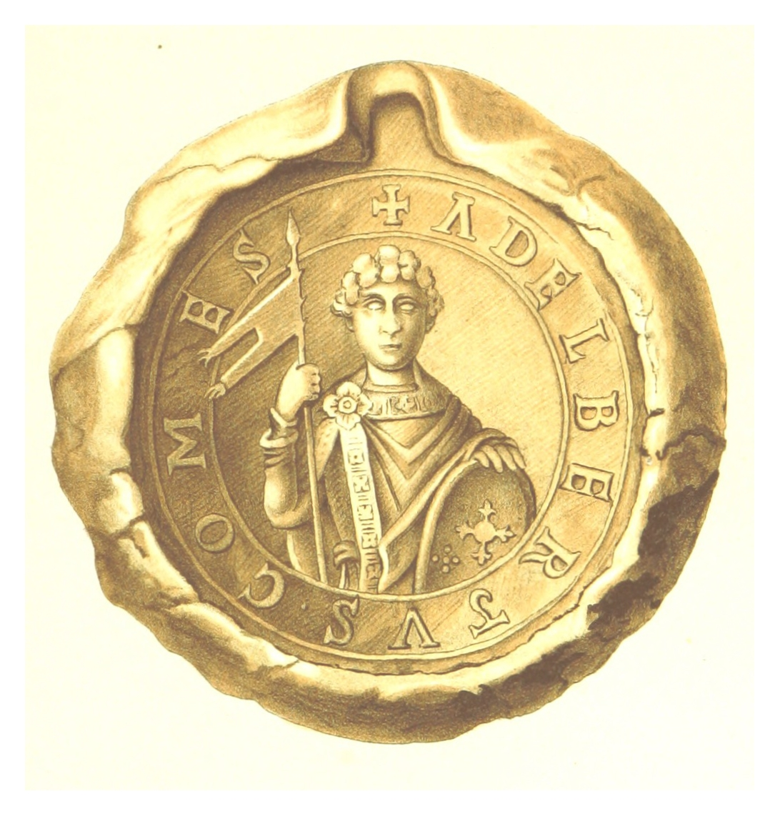 Graf Adalbert von Ballenstedt (um 1073)